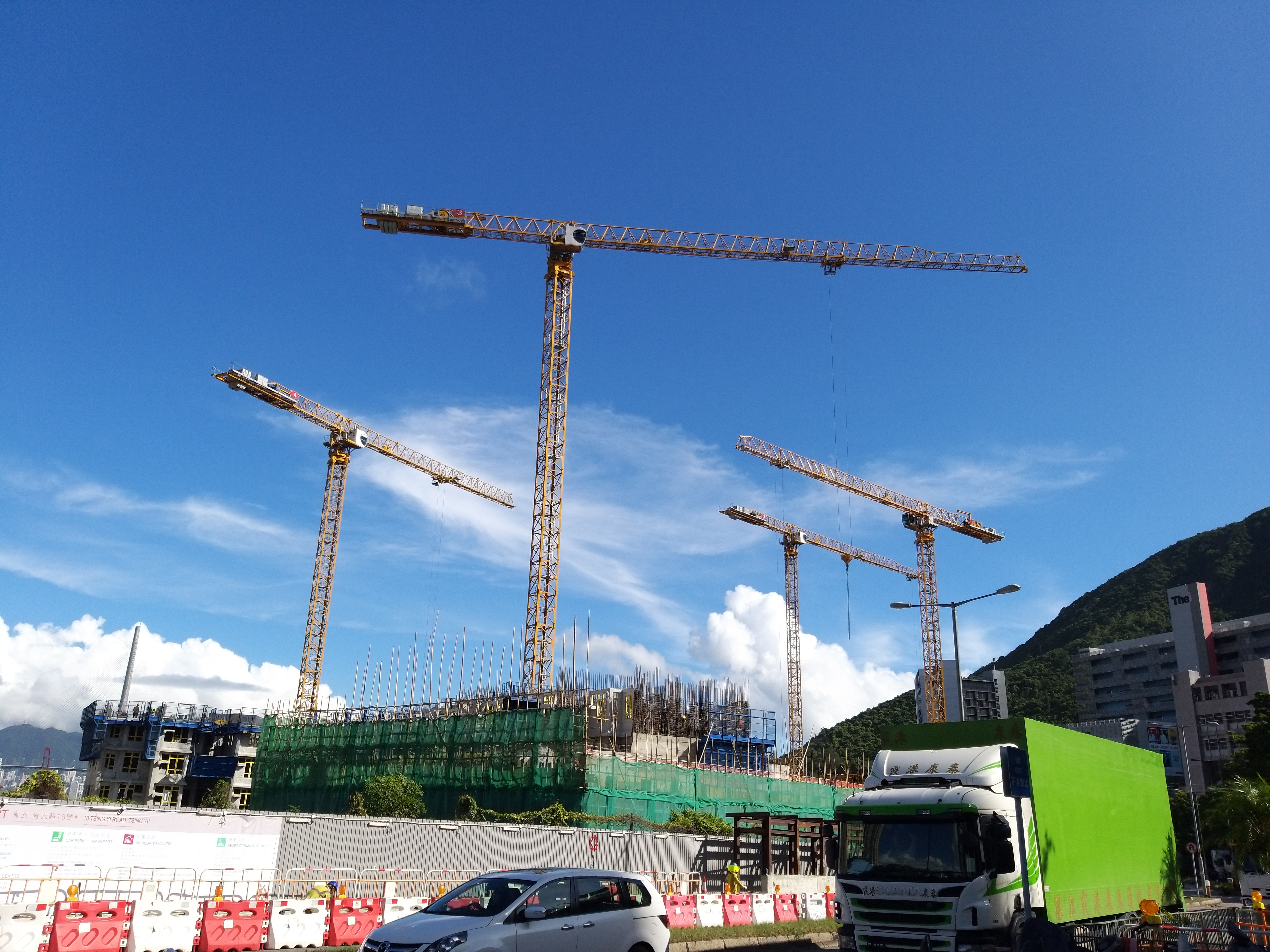 四座天秤已全數裝妥，進入全速施工階段